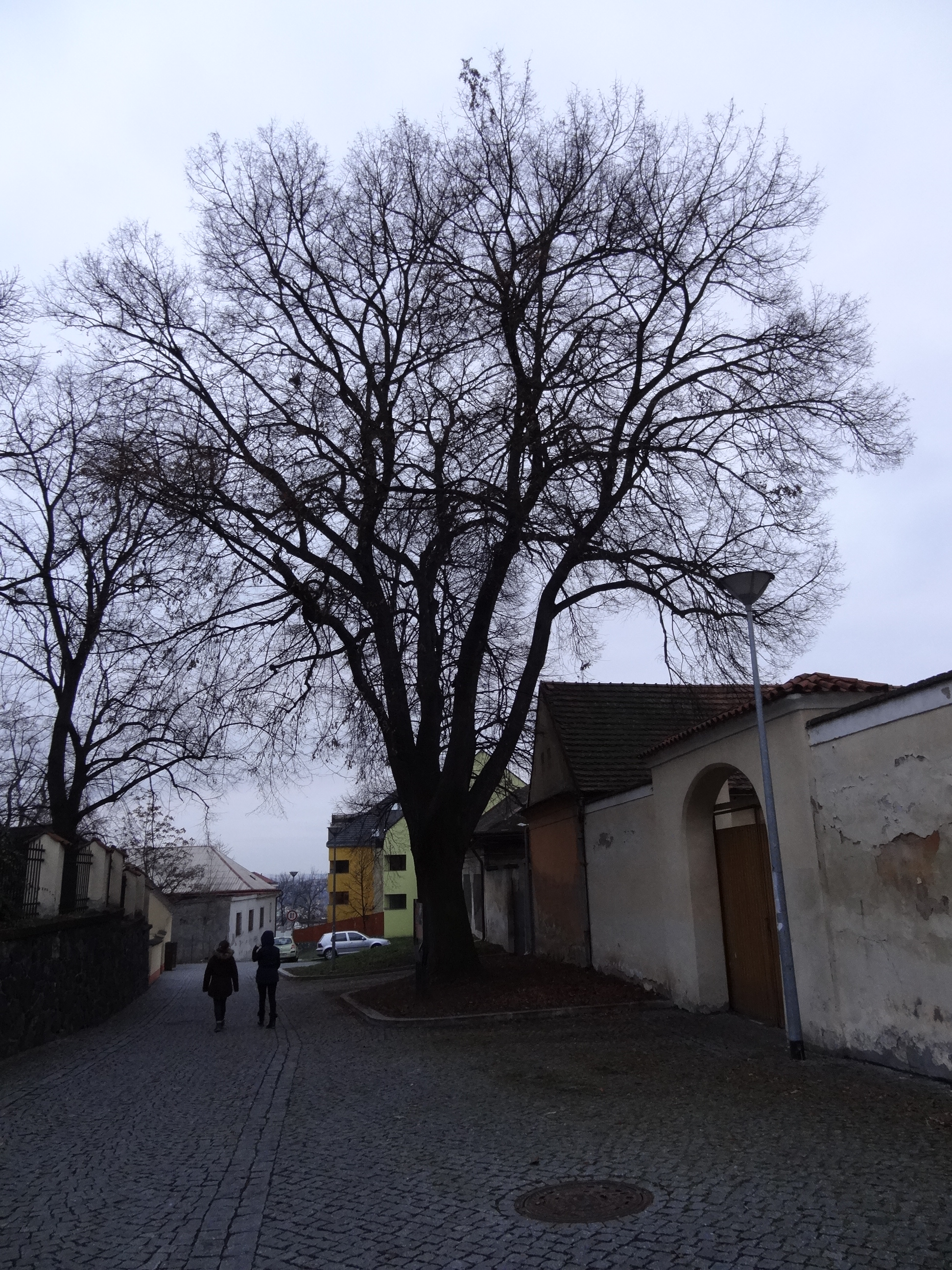 Prosek - památná lípa proti kostelu sv. Václava